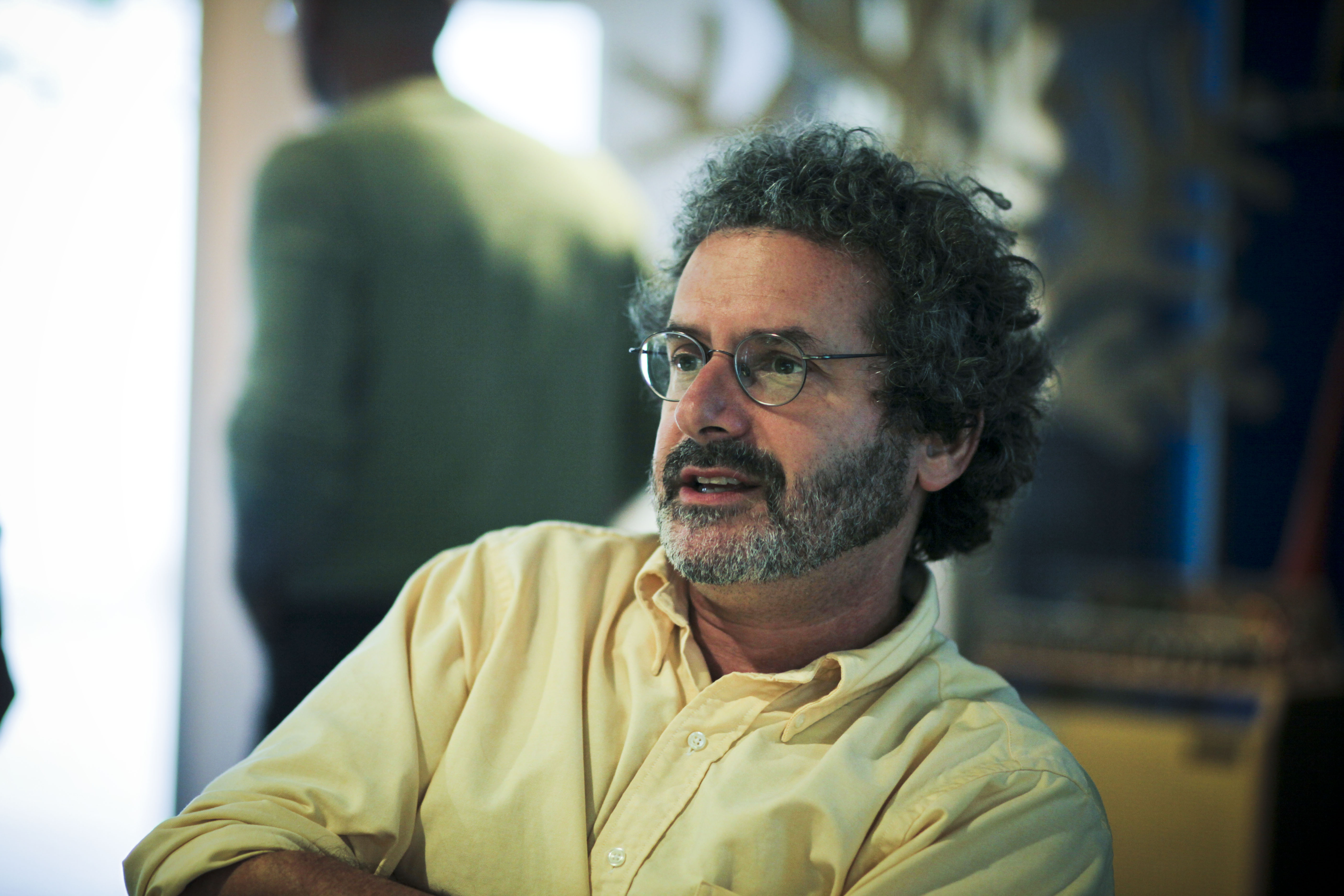 Neil Gershenfeld